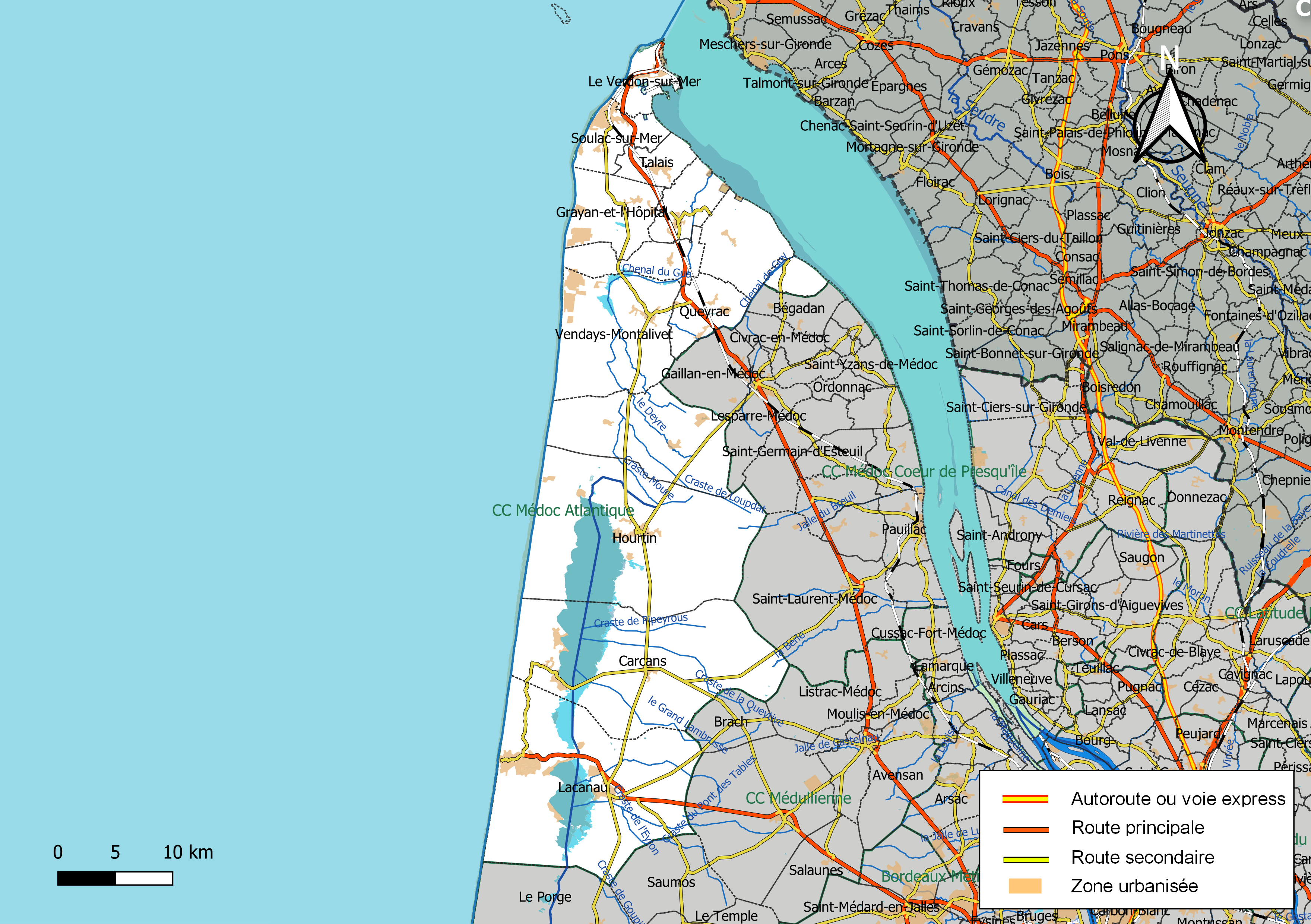 Carte géographique de la Communauté de communes Médoc Atlantique, département de la Gironde, France. Composition au 1er janvier 2019.